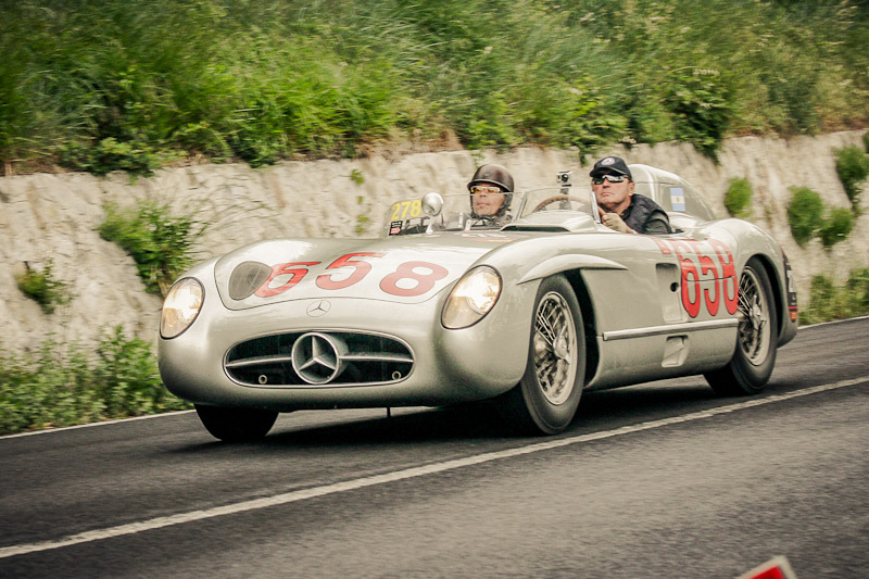 MILLE MIGLIA 2012 - SS della Futa a Pianoro (BO)